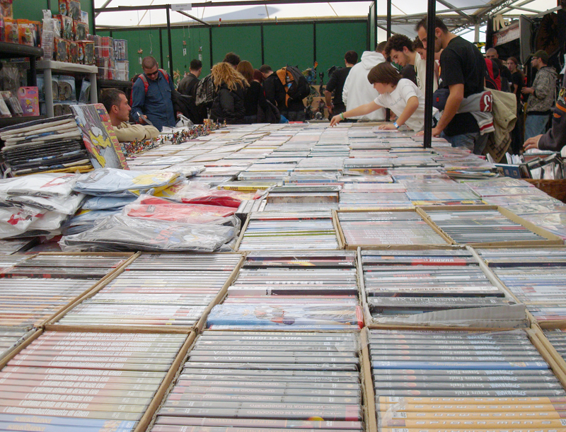 Lucca Comics e Games 2007 - interno di un padiglione